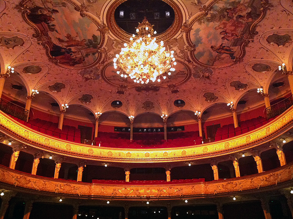 Opernhaus Zürich, Innenraum von der Bühne aus gesehen